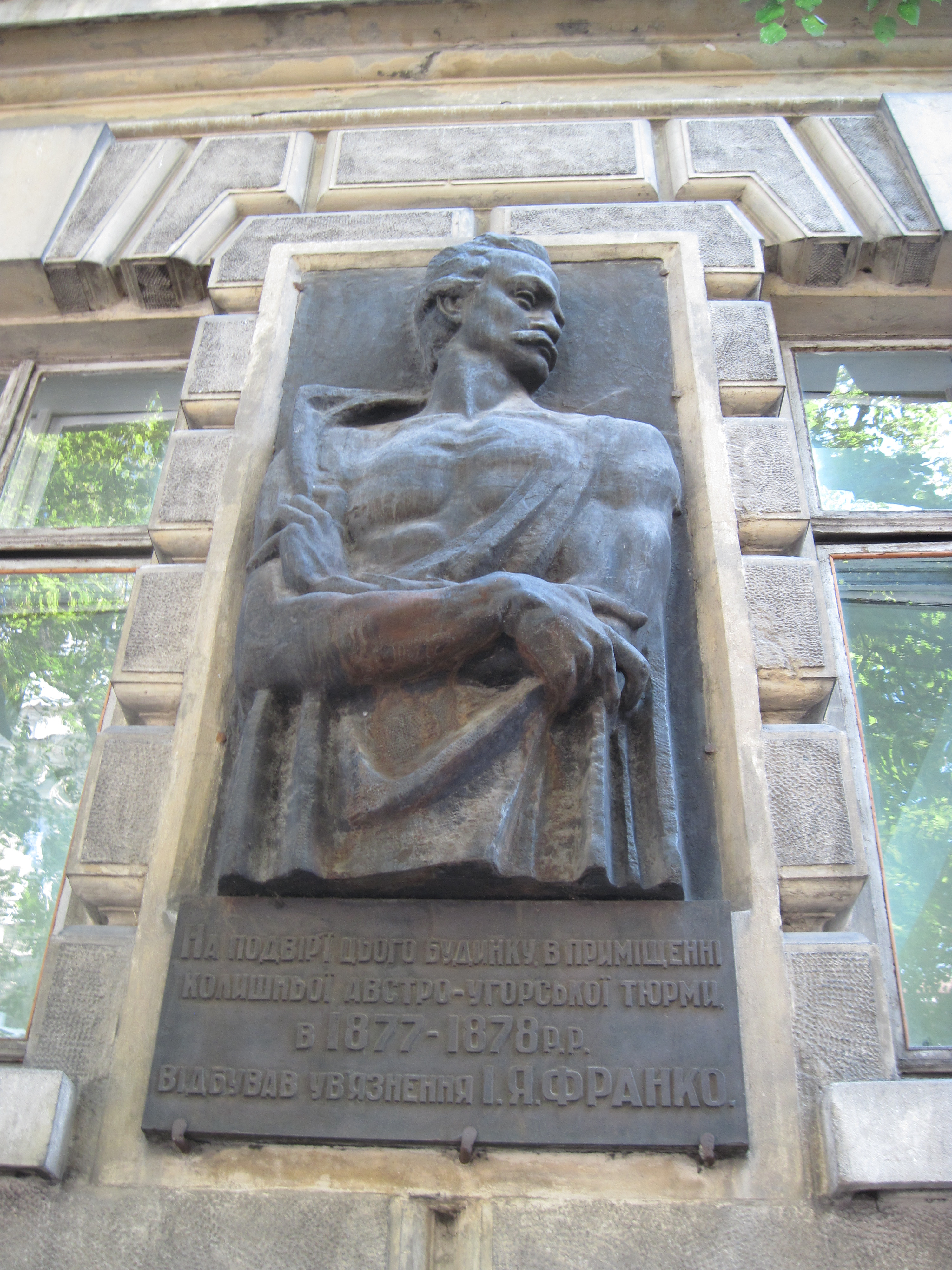 Іван Франко. Пам'ятна дошка, вул. Князя Романа, Львів